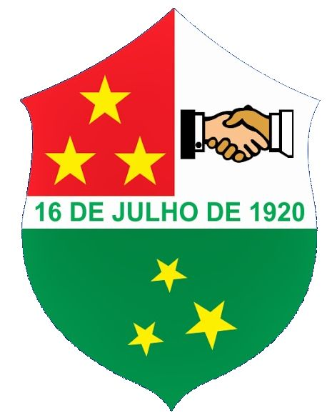 Brasão de Armas do município de Trindade, Goiás, Brasil.